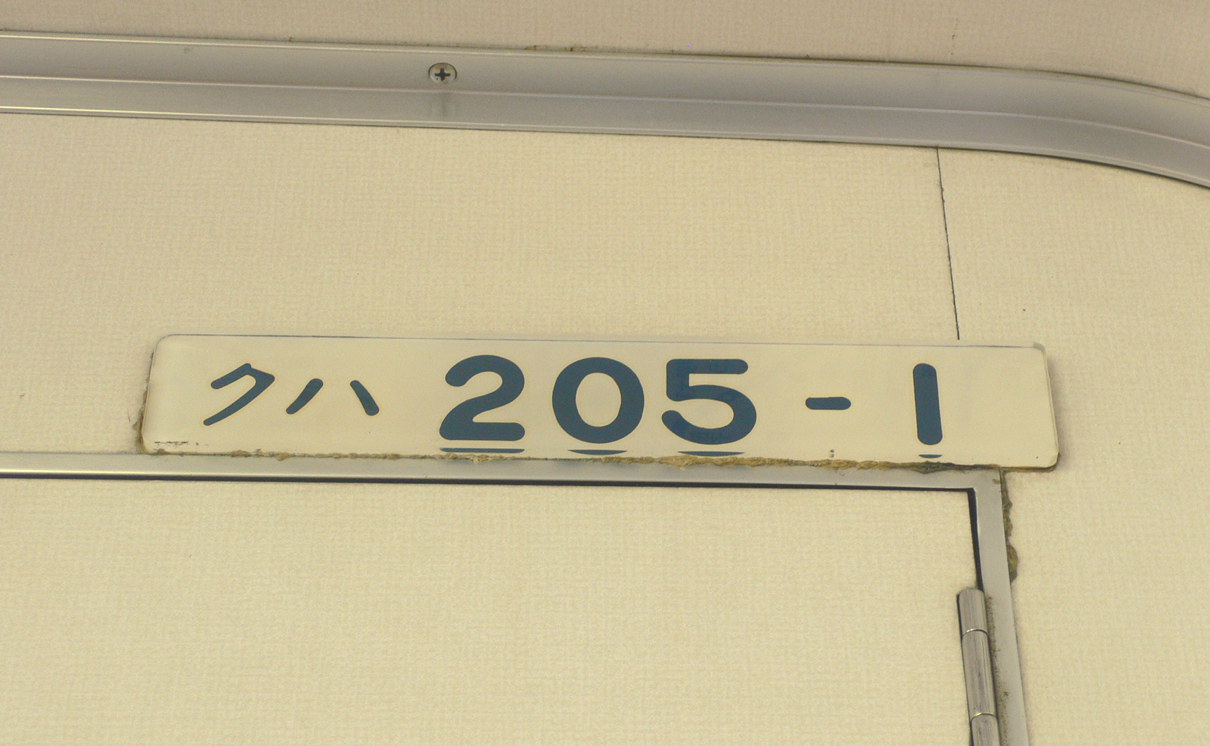 JR東日本クハ205-1車内プレート